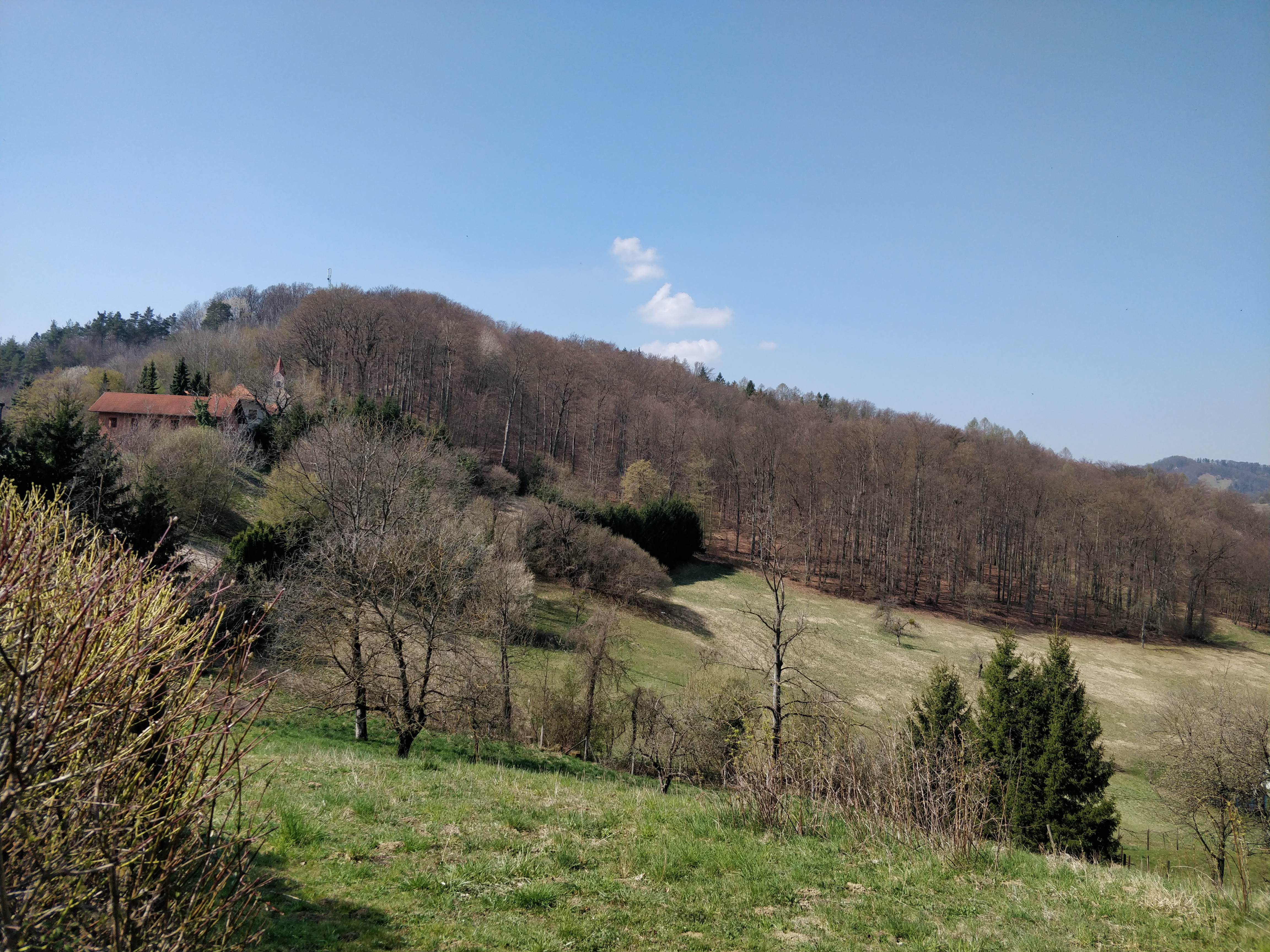 Pogled na grič Samotni bor iz smeri Vinarja v Mestni občini Maribor.